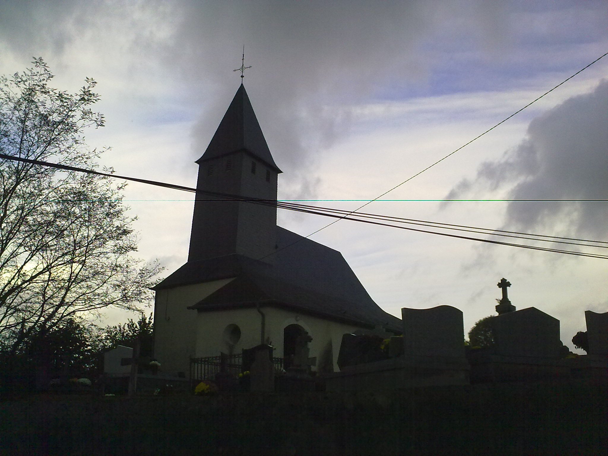 Doazon